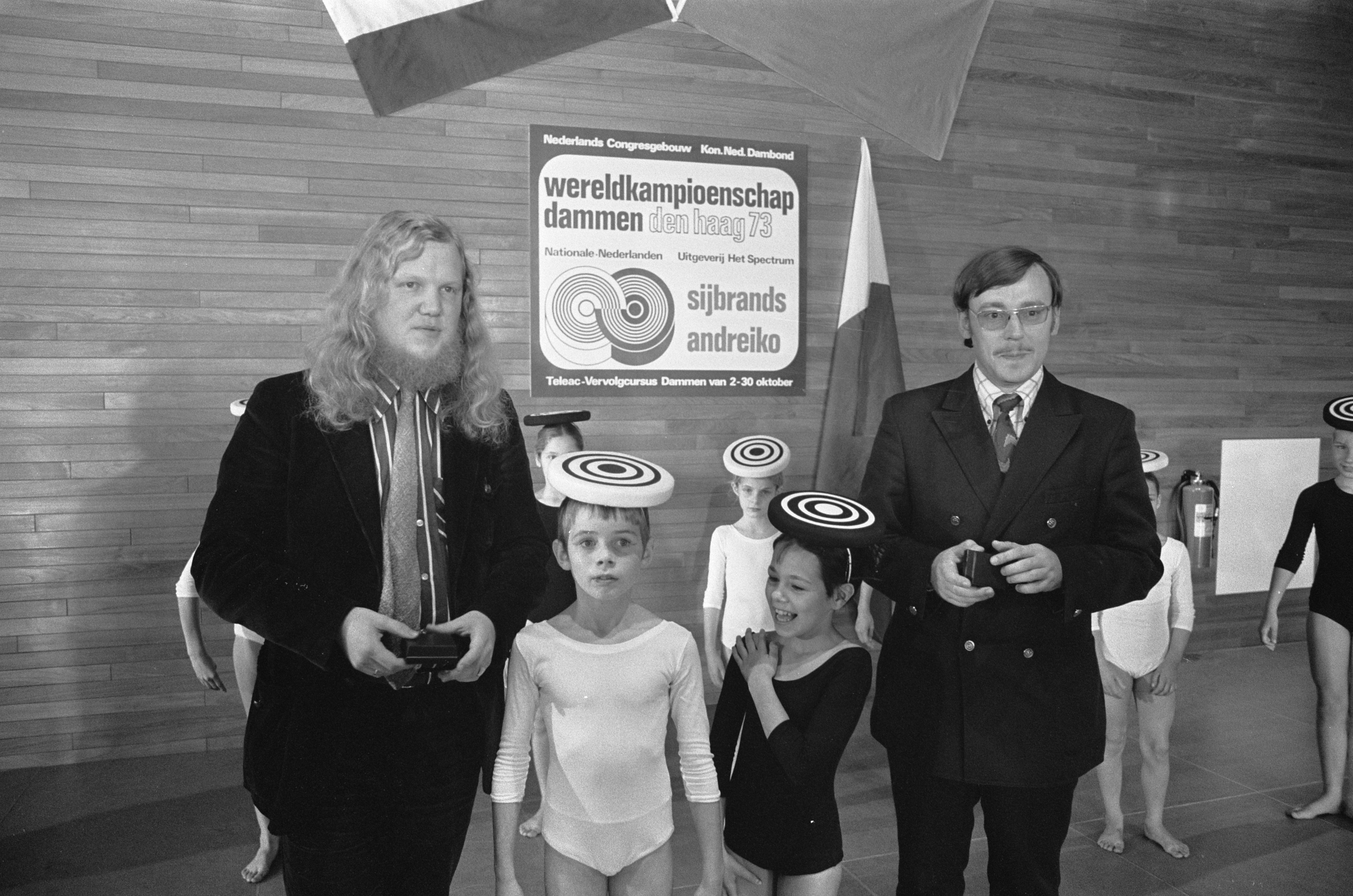 Sijbrands (links) en Andreiko loten voor wereldkampioenschappen dammen in Den Haag